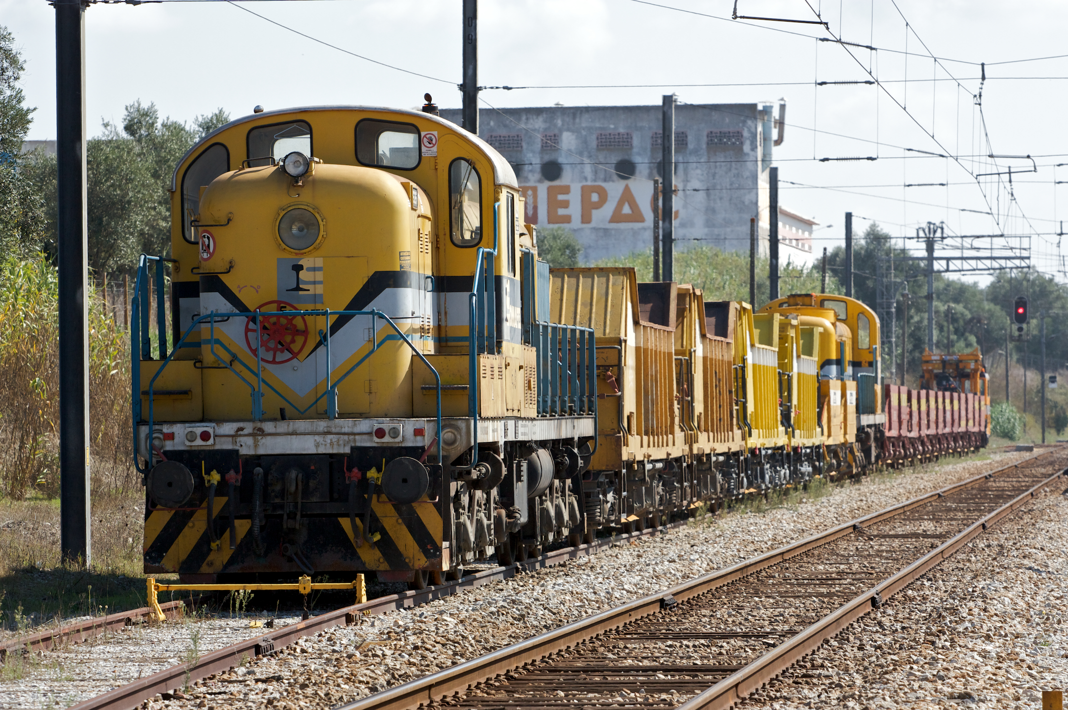 Local: Estação de Alcácer do Sal [Linha do Sul, PK 78] Data e hora: 13 de Outubro de 2010 [12h52] Material: Locomotiva 1525 [Alco] + 5 vagões Ferrovias Us N.º UIC: 90 94 200 0020-2 P (Somafel 1417) Material: Locomotiva 1511 [Alco] + 6 vagões Somafel Us N.º UIC: 93 94 200 0031-6 P (Somafel 1420)